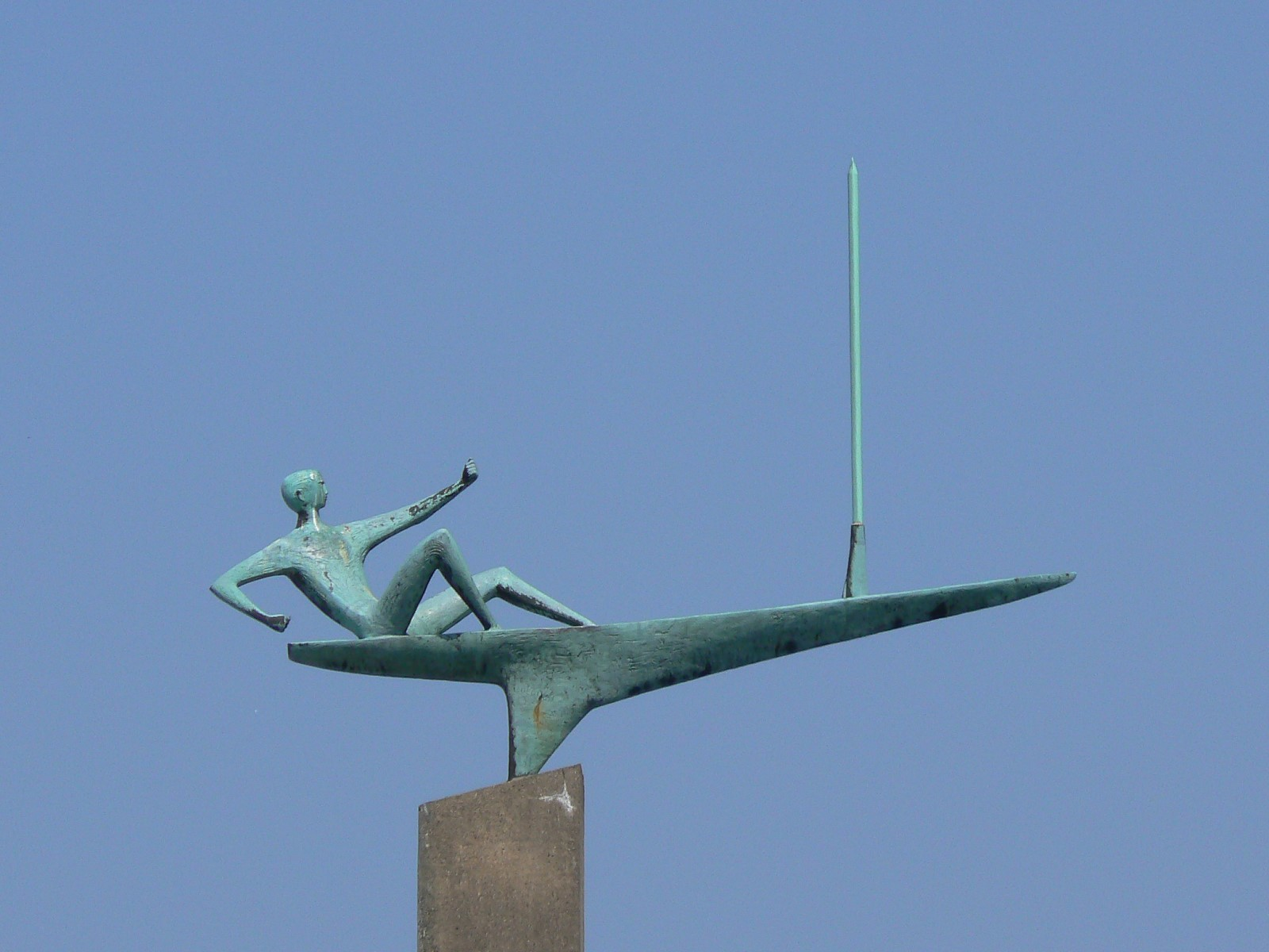 Skulptur Segler. Bildhauer: Karlheinz Goedtke (1962), Bronze auf Beton-Stele. Standort: Ostseekai in Kiel. Ausschnitt ohne die Beton-Stele (vgl. Image:Segler_Goedtke_Kiel.jpg).